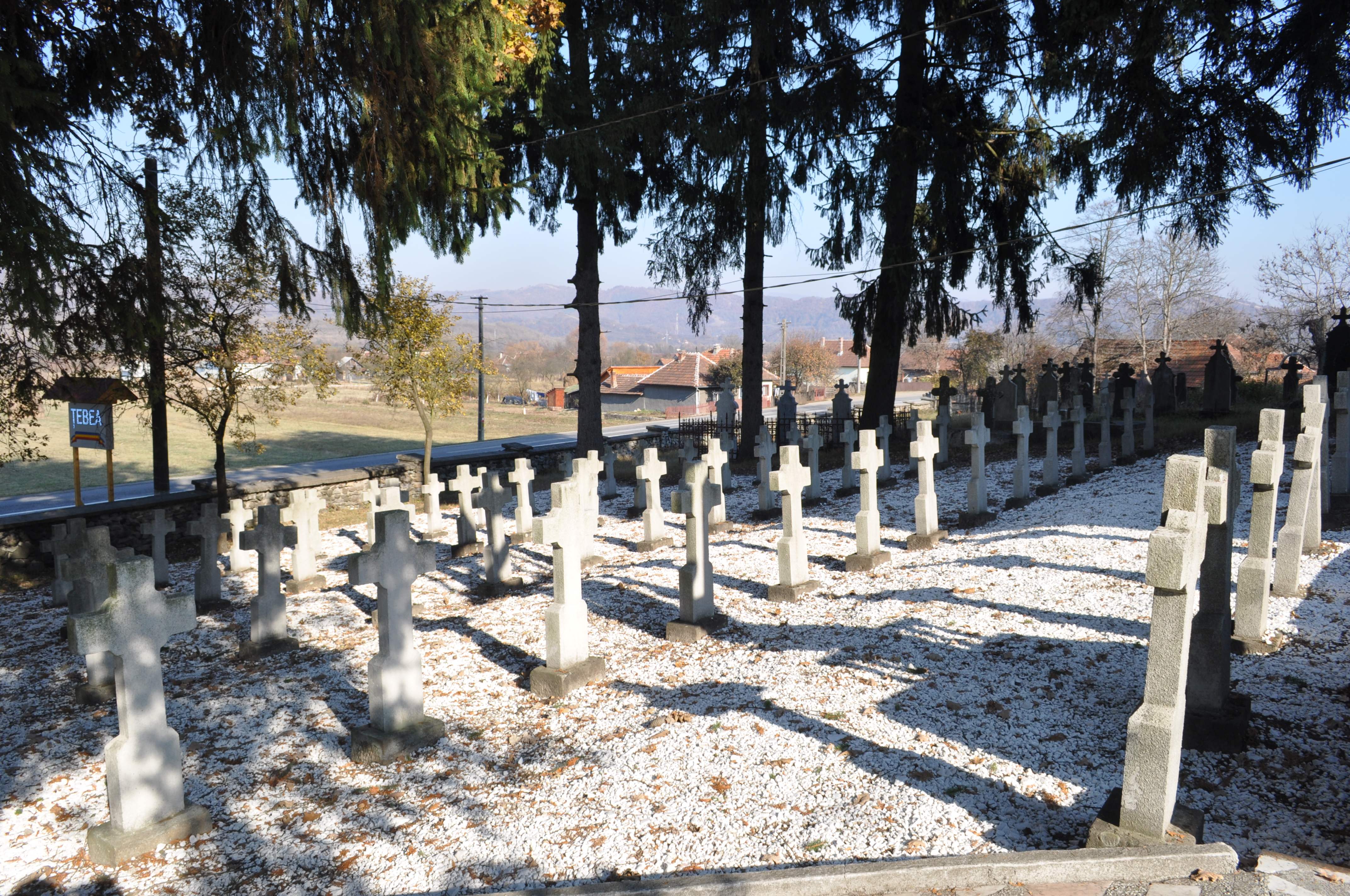 Țebea, județul Hunedoara